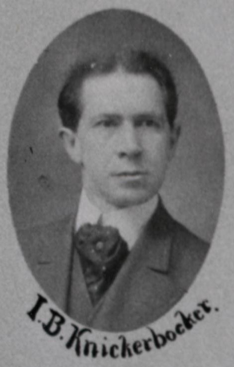 Sen I.B. Knickerbocker